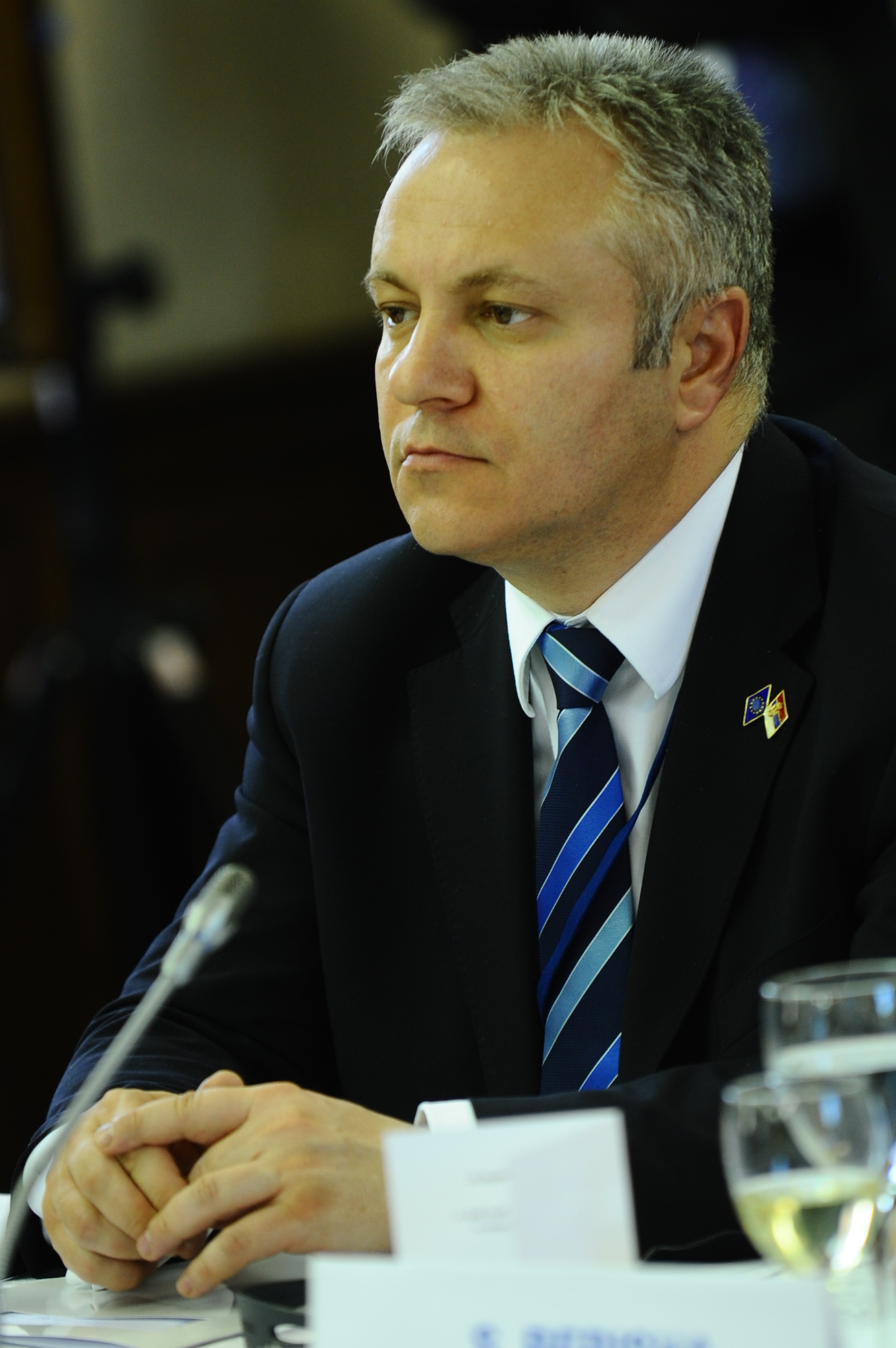 Mlađan Dinkić at EPP Summit March 2011